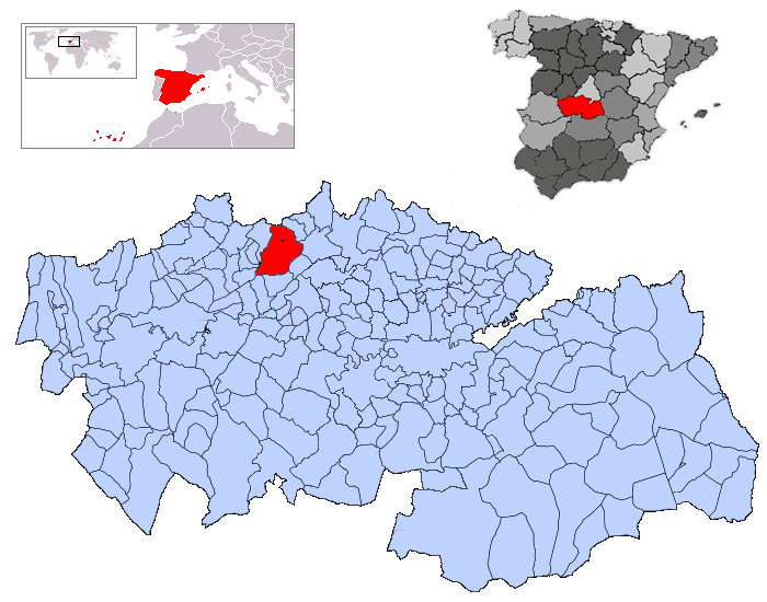 Nombela en la provincia de Toledo